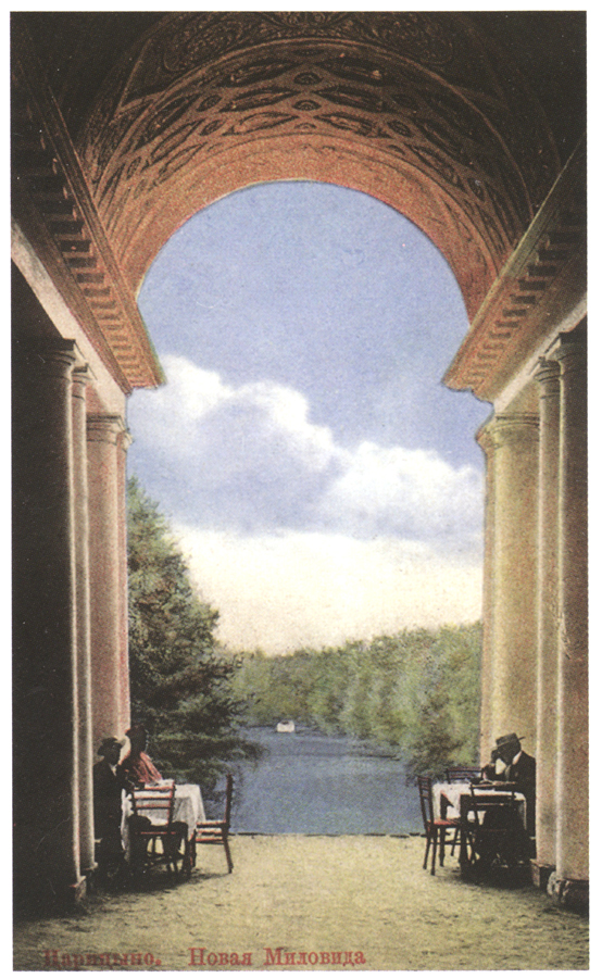 Павильон «Миловида» в начале XX века. Открытка